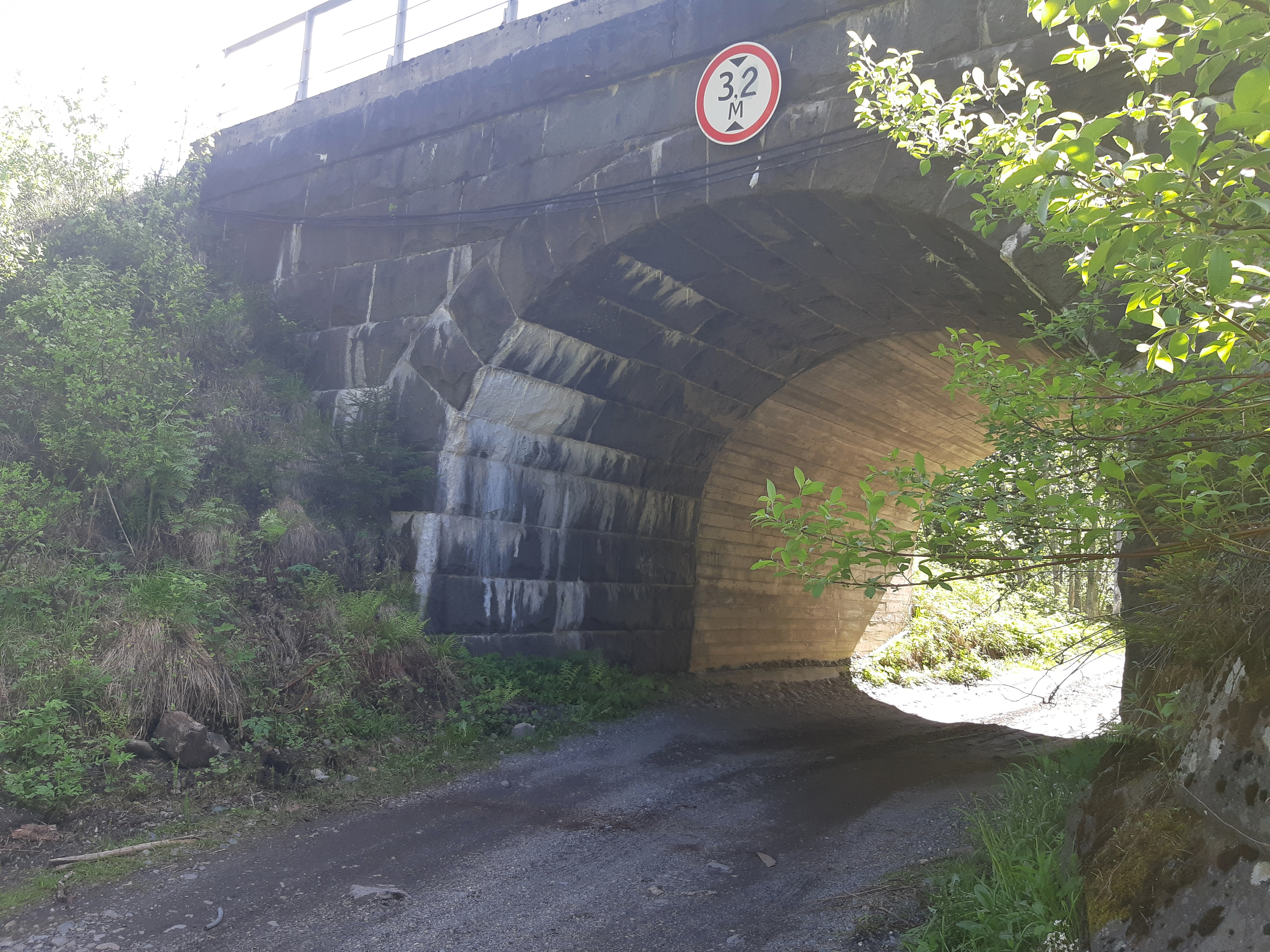 Янисъярви.